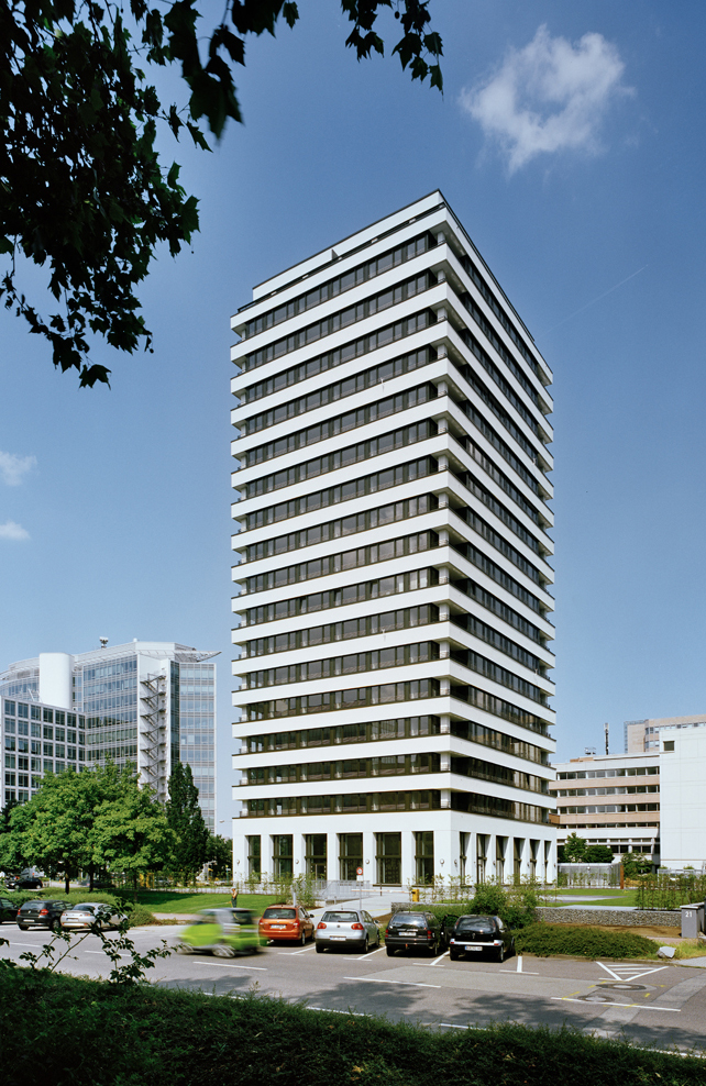 Wohnhochhaus Lyoner Straße 19 nach dem Umbau, Aufstockung um 3 Geschosse